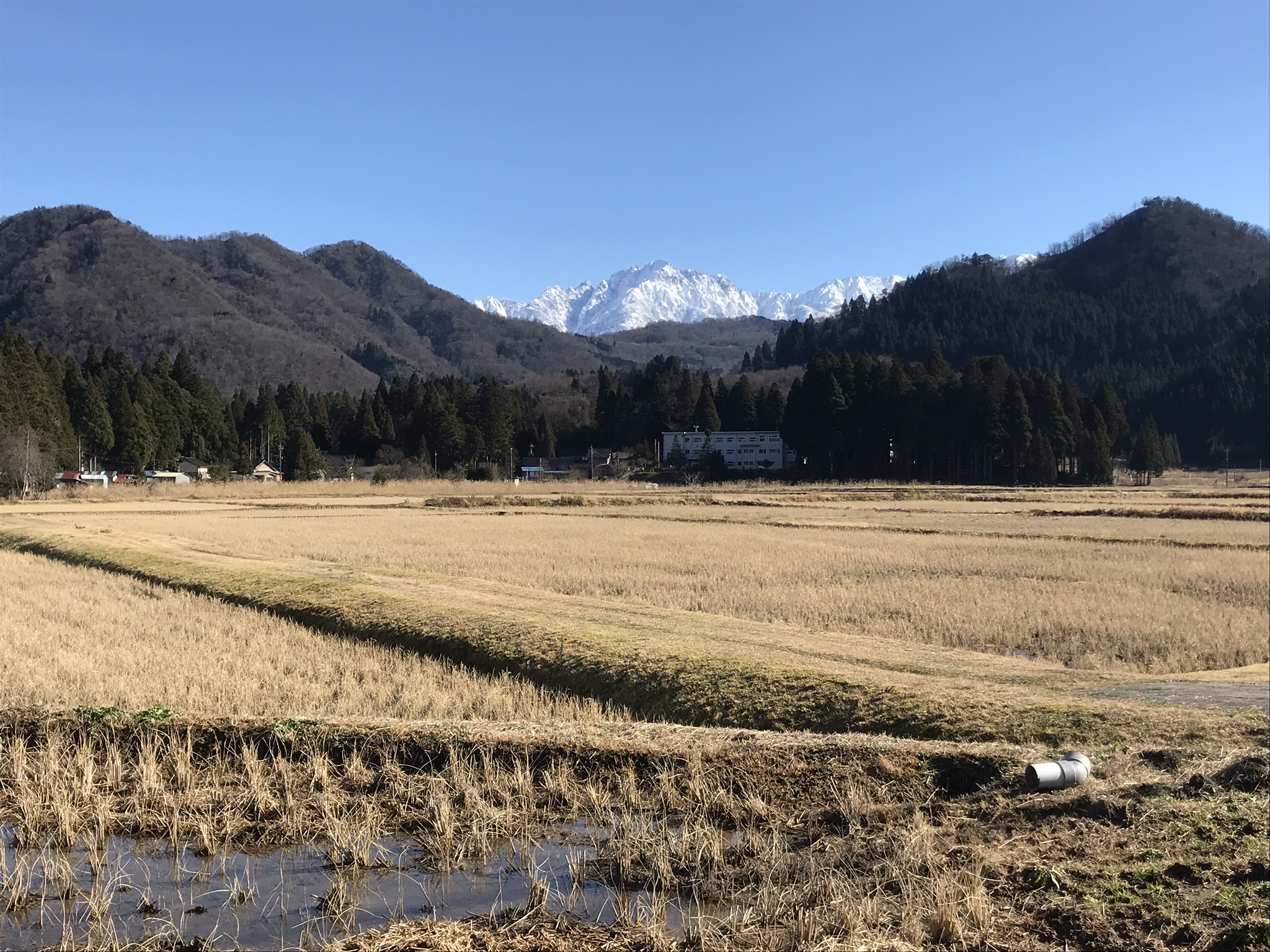 種盆地です